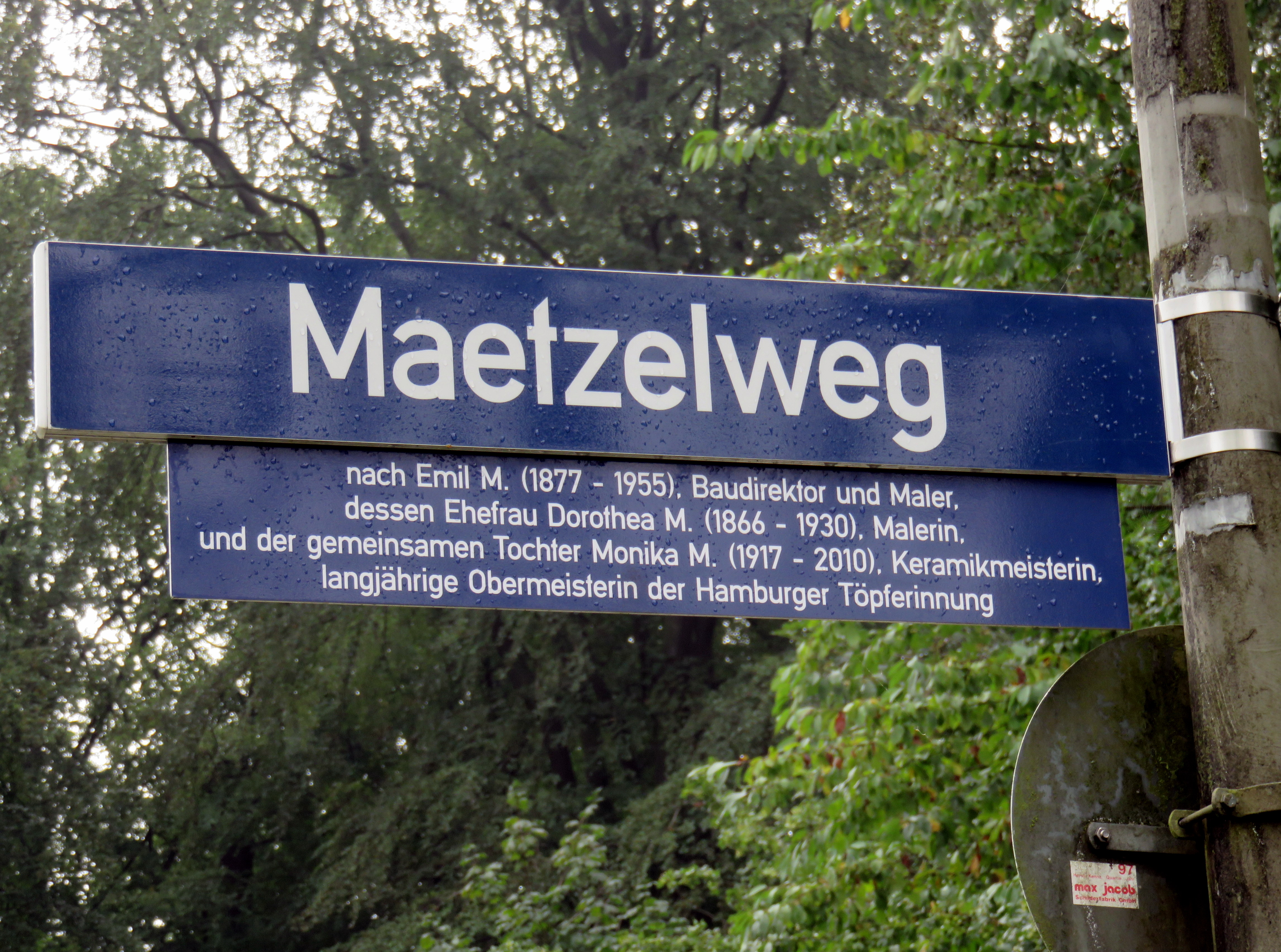 Straßenschild Maetzelweg in Hamburg-Volksdorf mit erläuterndem Zusatzschild zur Künstlerfamilie Maetzel: Emil Maetzel, Ehefrau Dorothea Maetzel-Johannsen und Tochter Monika Maetzel. Das Zusatzschild wurde auf Senatsbeschluss von August 2017 im Rahmen der Ehrung insbesondere weiblicher historischer Familienmitglieder an der Ecke Mellenbergweg angebracht. Siehe auch: hamburg.de.